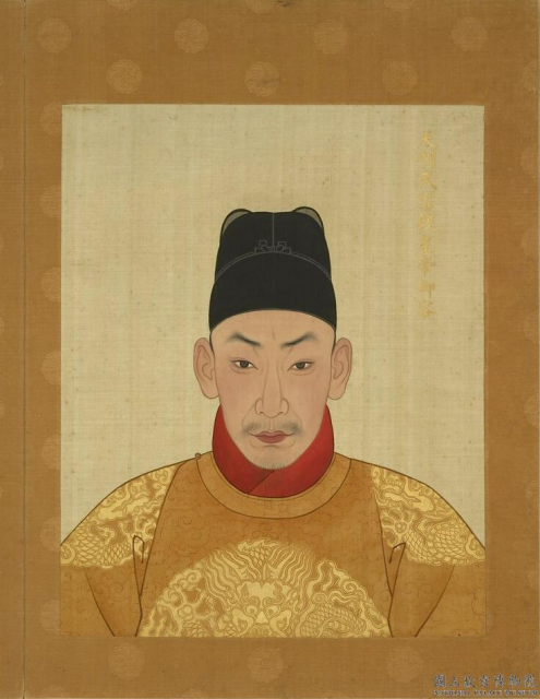 中文（中国大陆）: 作者已经去世超过200年，作品已经进入公有领域。